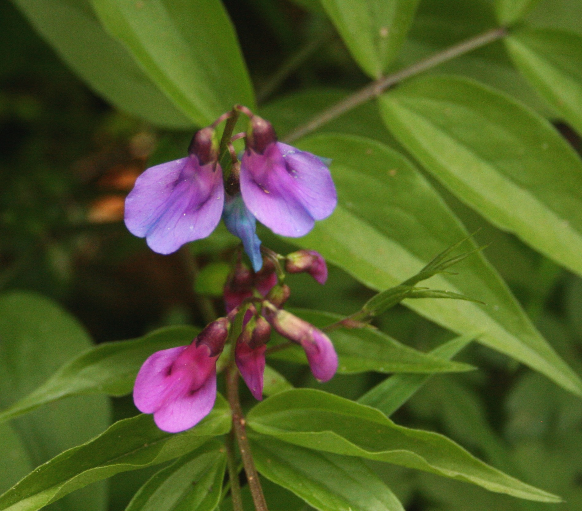 Groszek wiosenny